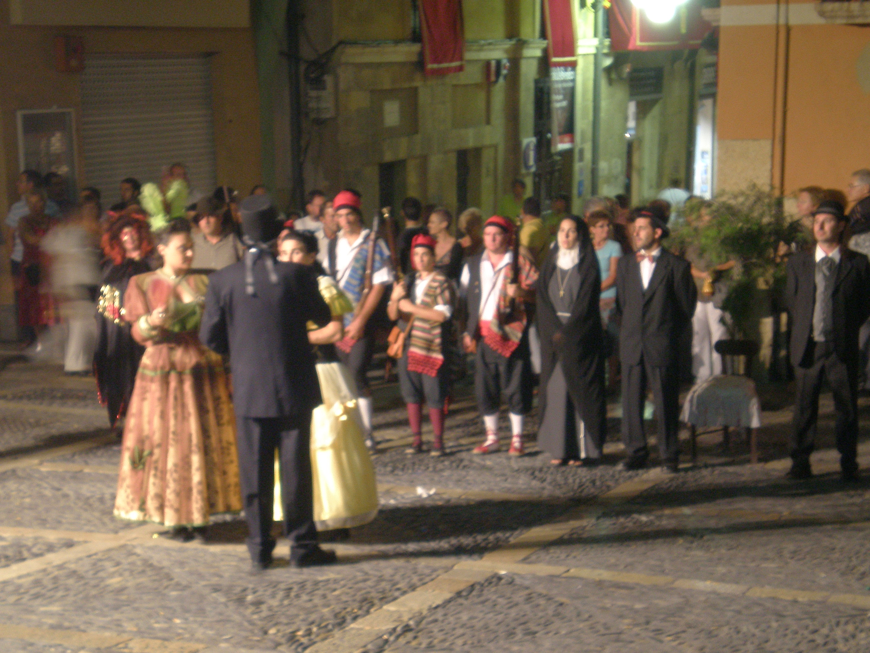 Ball de la Rosaura